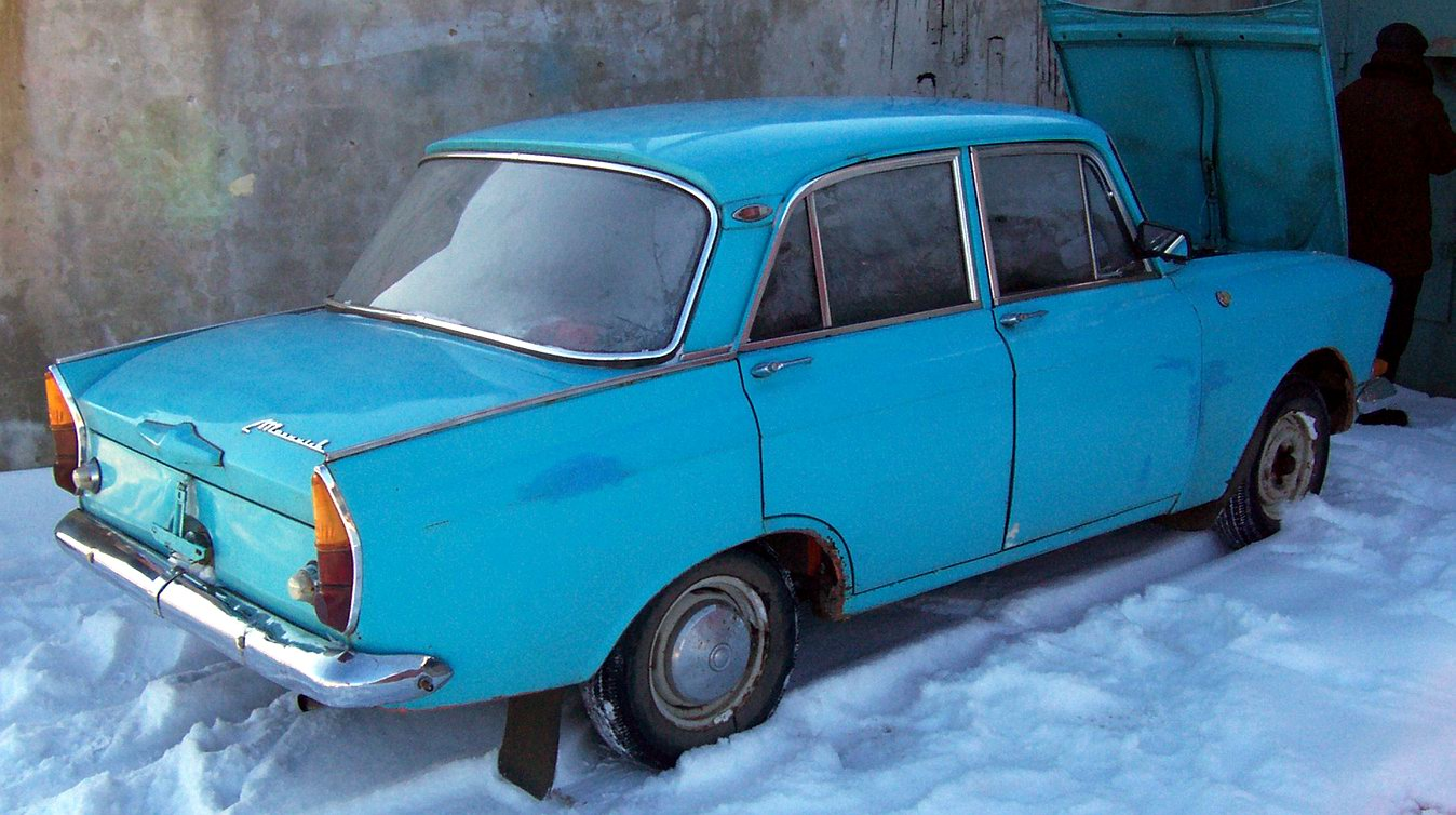 Photo by Stanislav Alexeyev aka DL24.